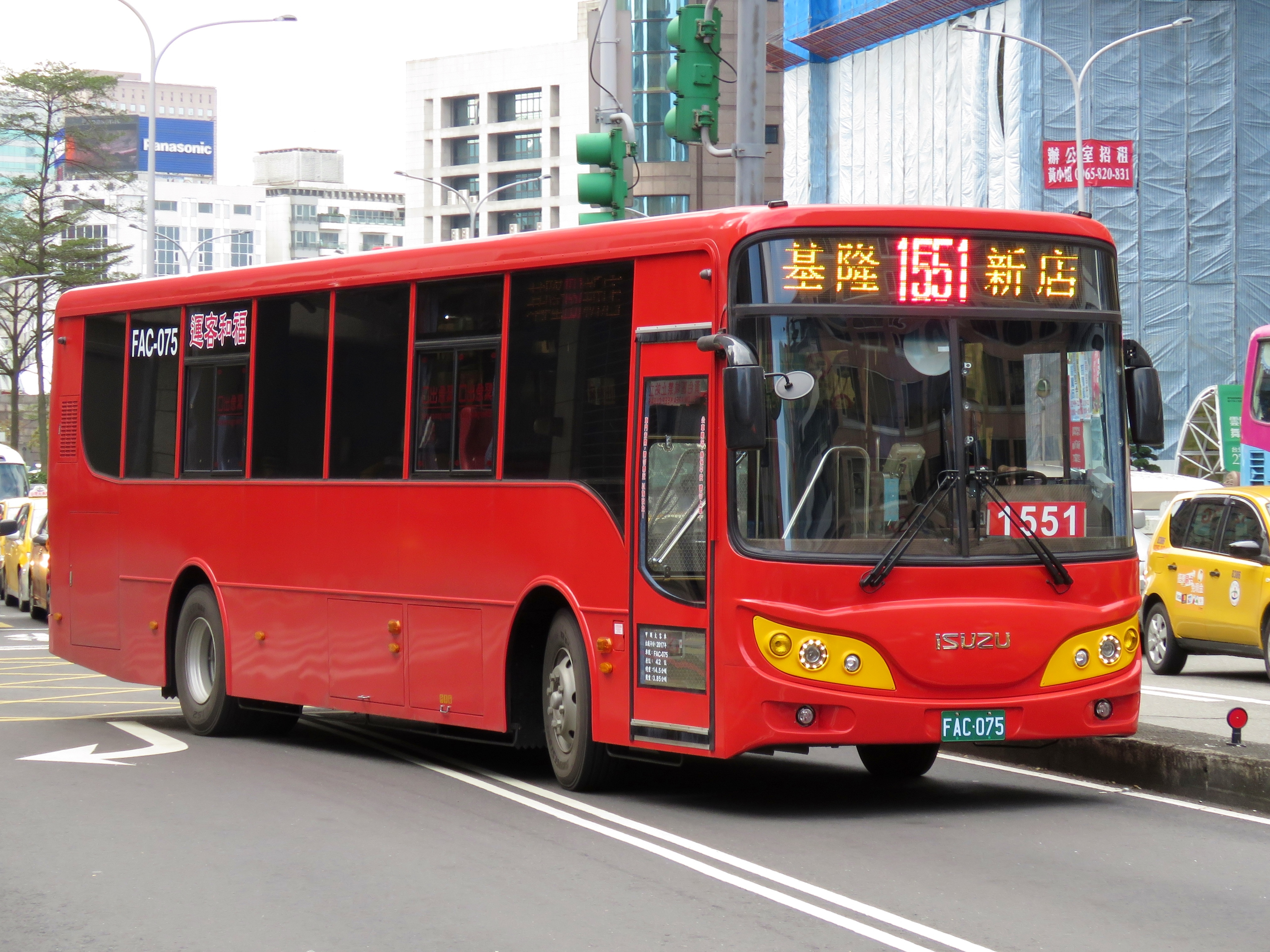 中文（台灣）: 2017 Isuzu LT134PL5 FAC-075 1551路 新店→基隆